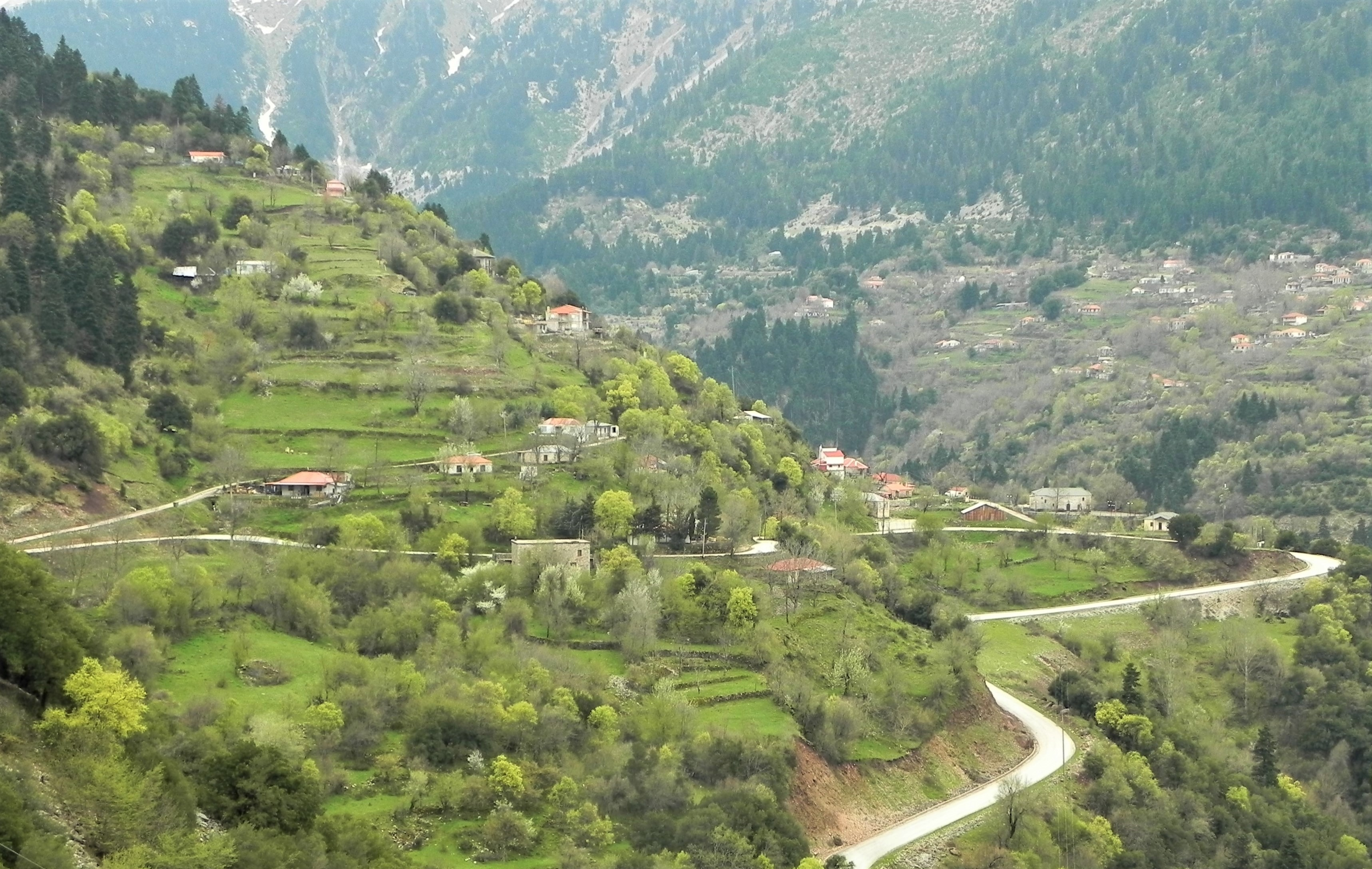 Το Παλαιοχώρι όπως φαίνεται από τη θέση "Σταυρός Κοπλεσιώτικος" πάνω στον δρόμο Μουζακίου-Ι.Μ. Σπηλιάς.